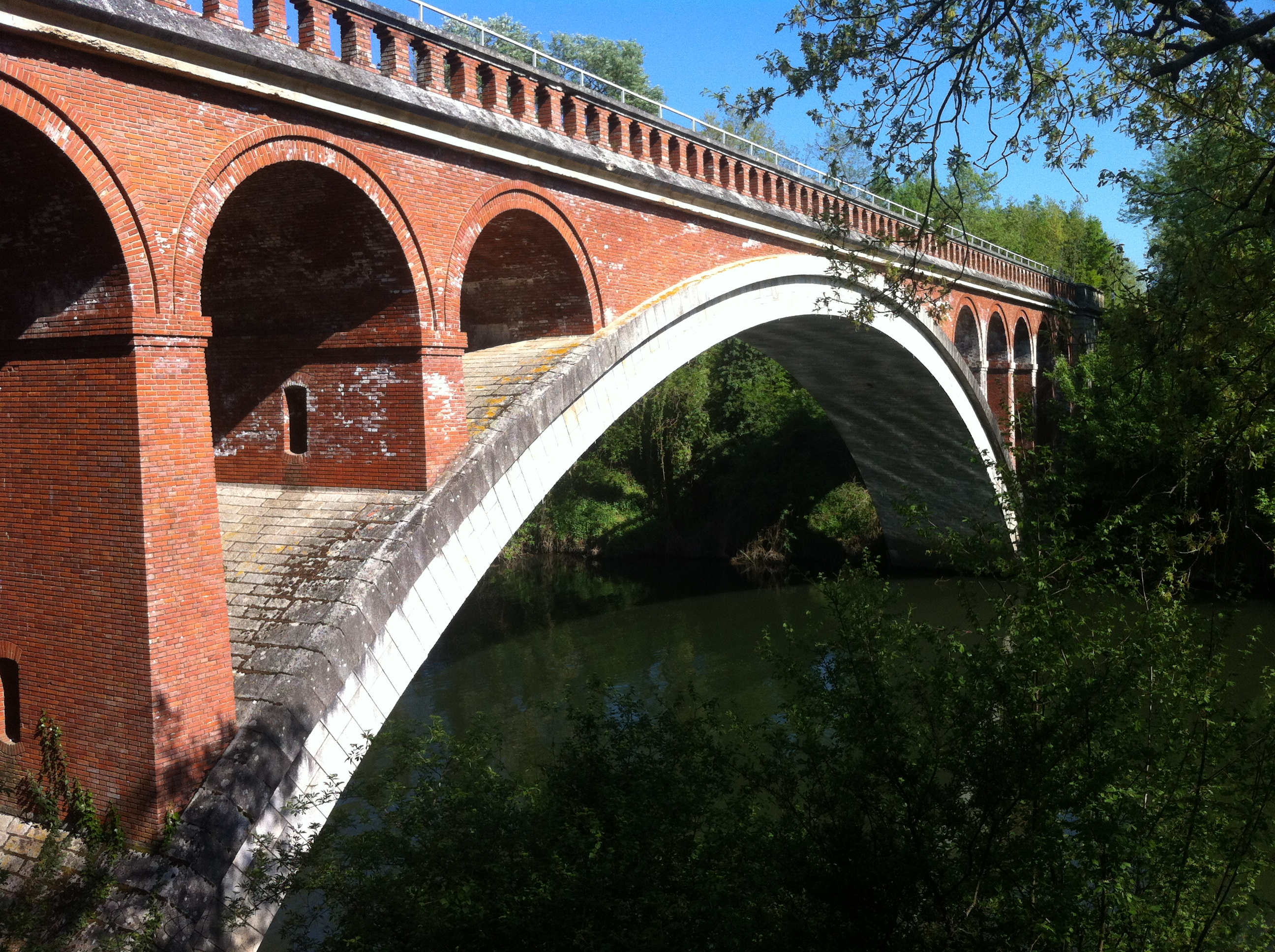 Vue depuis la commune de Vielmur-sur-Agout (Tarn-France) du Pont Antoinette pensé et conçu par l'architecte français Paul Séjourné en 1882. Ce pont enjambe la rivière Agout et permet à la l'ancienne ligne de chemin de fer Montauban-Castres de franchir cet obstacle naturel. Aujourd'hui la ligne ferroviaire empruntant ce pont est "Toulouse-Mazamet".